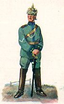 Jäger des Jäger-Regiments zu Pferde Nr. 6, Erfurt um 1910